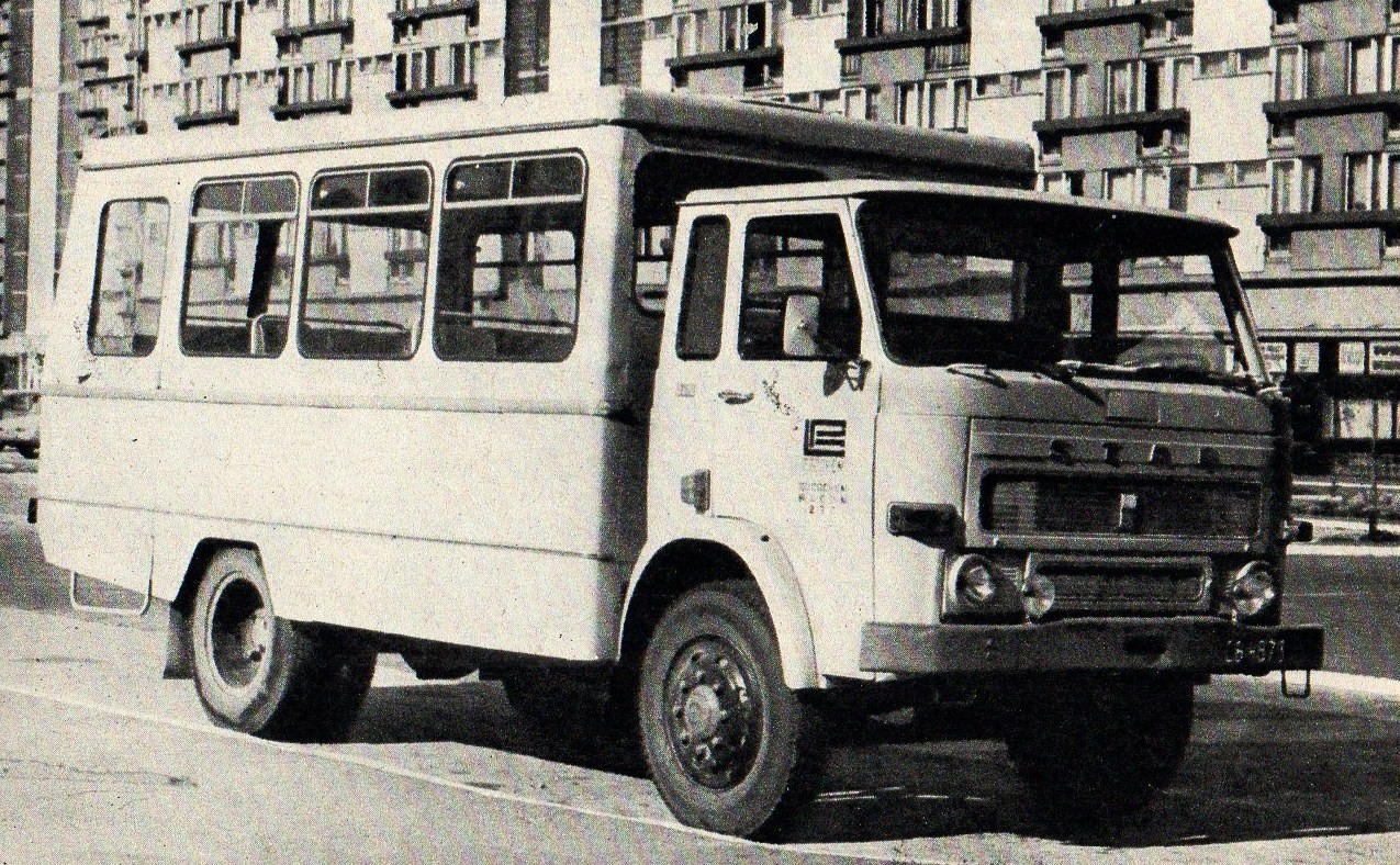 Osinobus na bazie ciężarówki Star 28/29.